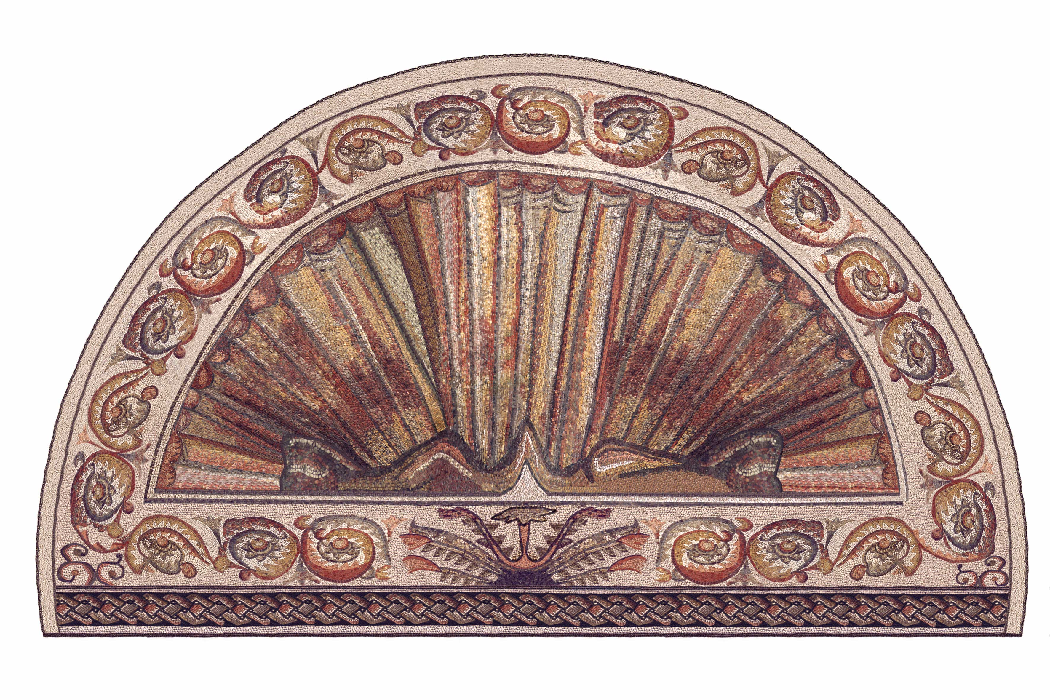 Imagen de la cabecera restaurada de la villa romana de Fuente Álamo. Se encuentra en el oecus de la misma.